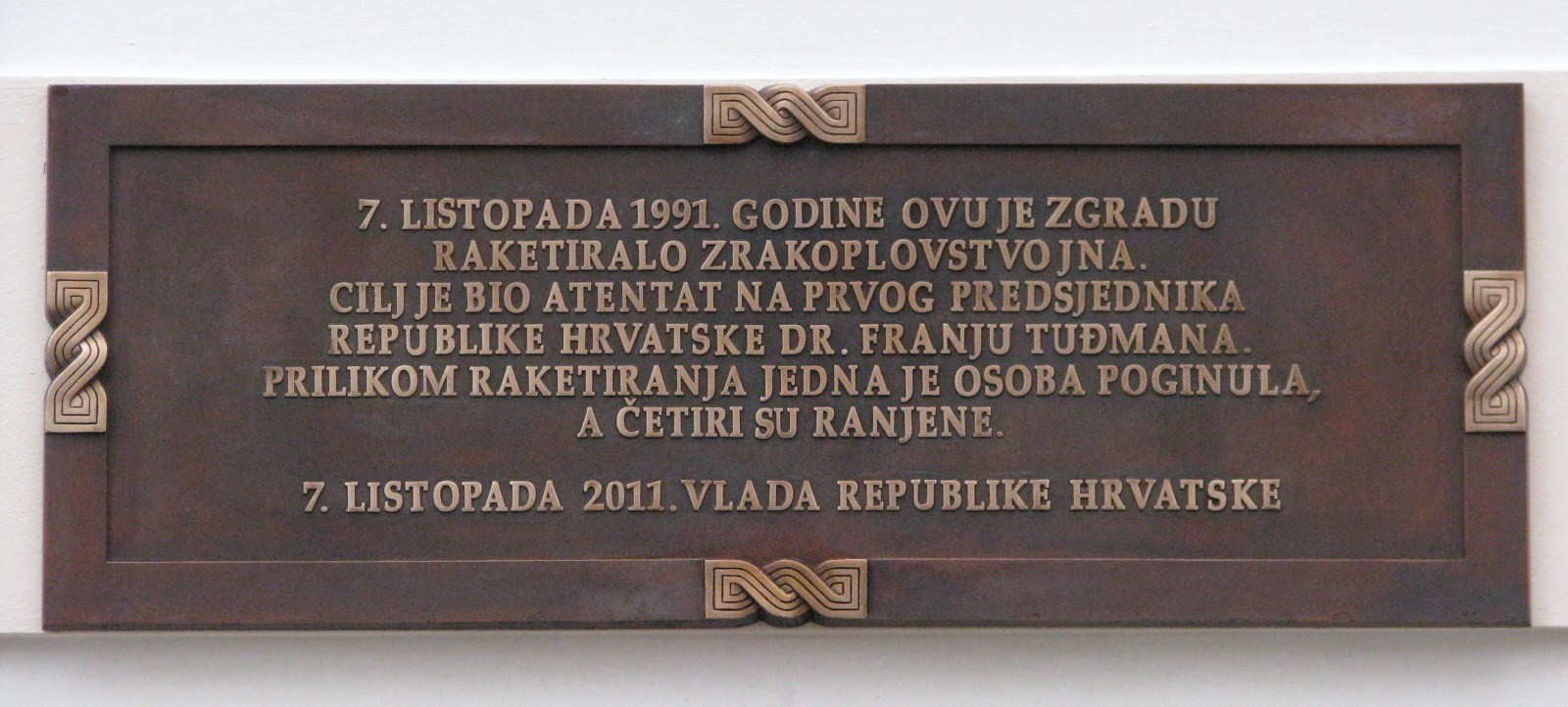 Spomen ploča na zgradi Vlade Republike Hrvatske, postavljena na 20. obljetnicu raketiranja Banskih dvora